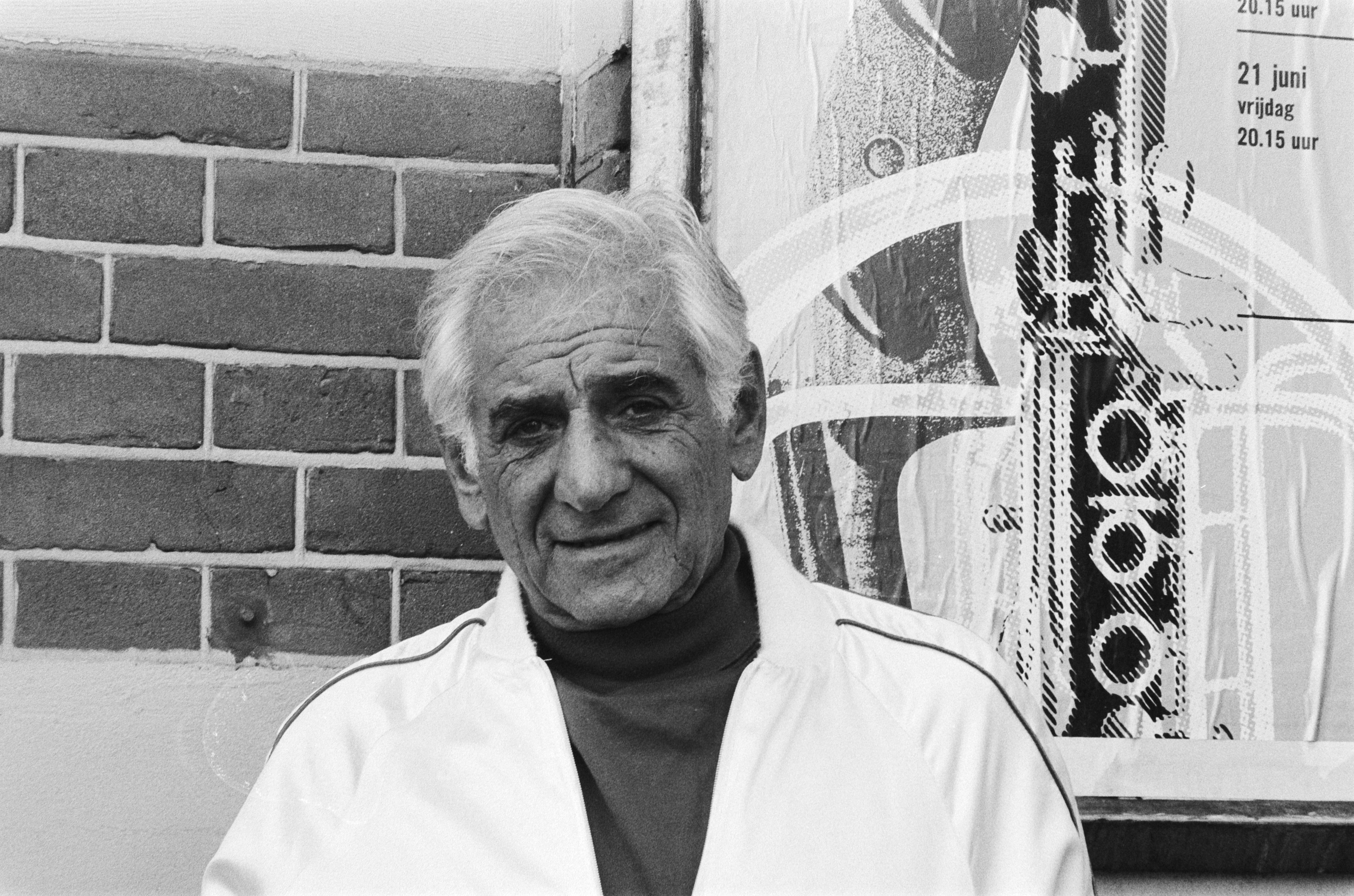 Collectie / Archief : Fotocollectie Anefo Reportage / Serie : [ onbekend ] Beschrijving : Holland Festival ; dirigent Leonard Bernstein zal het met het Concertgebouworkest openen, Leonard Bernstein (kop) Datum : 30 mei 1985 Trefwoorden : dirigenten, festivals, openingen Persoonsnaam : Bernstein Leonard Instellingsnaam : Concertgebouworkest, Holland Festival Fotograaf : Vollebregt, Sjakkelien / Anefo Auteursrechthebbende : Nationaal Archief Materiaalsoort : Negatief (zwart/wit) Nummer archiefinventaris : bekijk toegang 2.24.01.05 Bestanddeelnummer : 933-3401